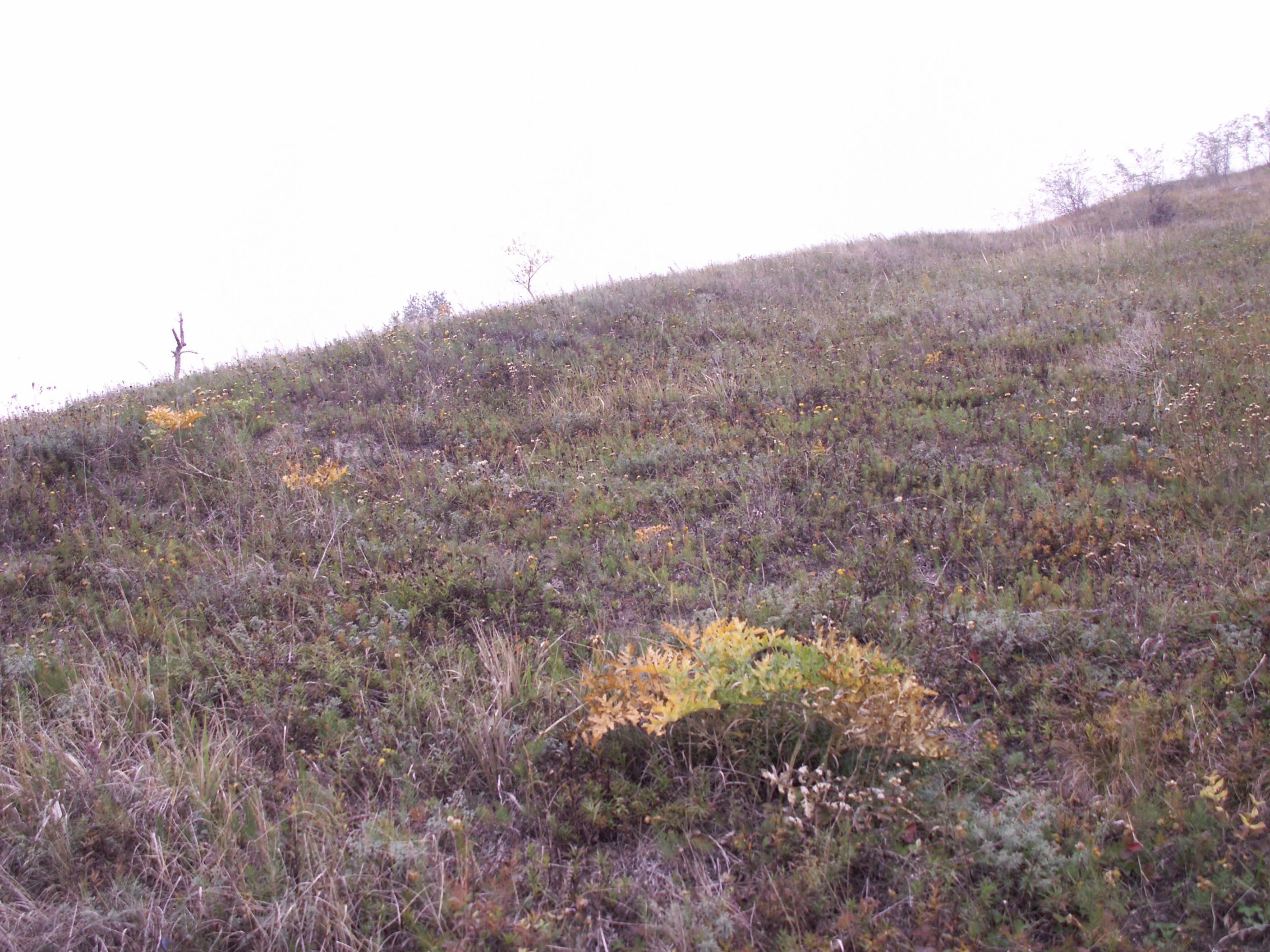 přírodní rezervace Špice, jižně kóty Stará hora (307), u obce Újezd u Brna, okres Brno-venkov